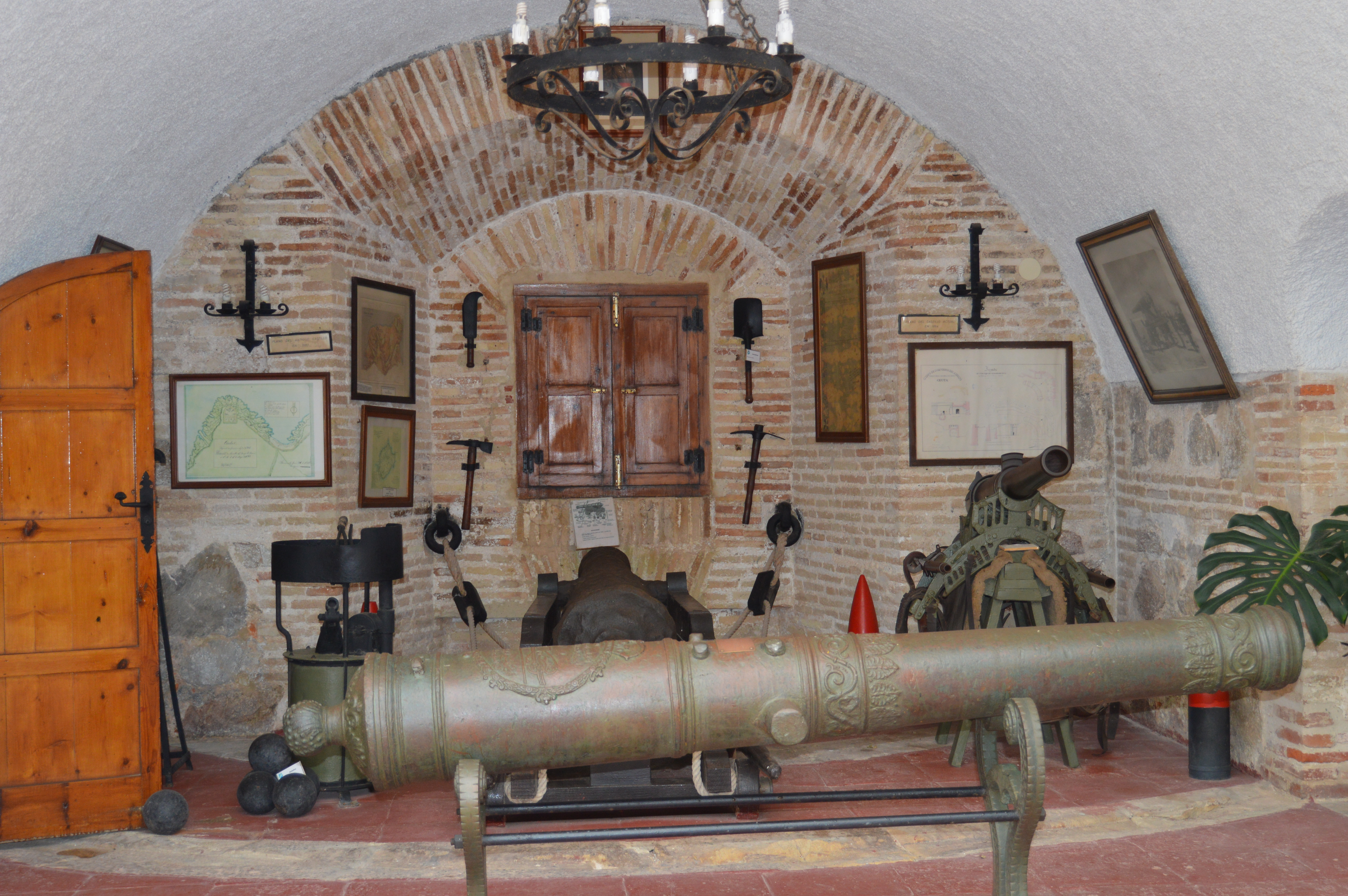 Museo en el Fuerte del Desnarigado, Ceuta, España.